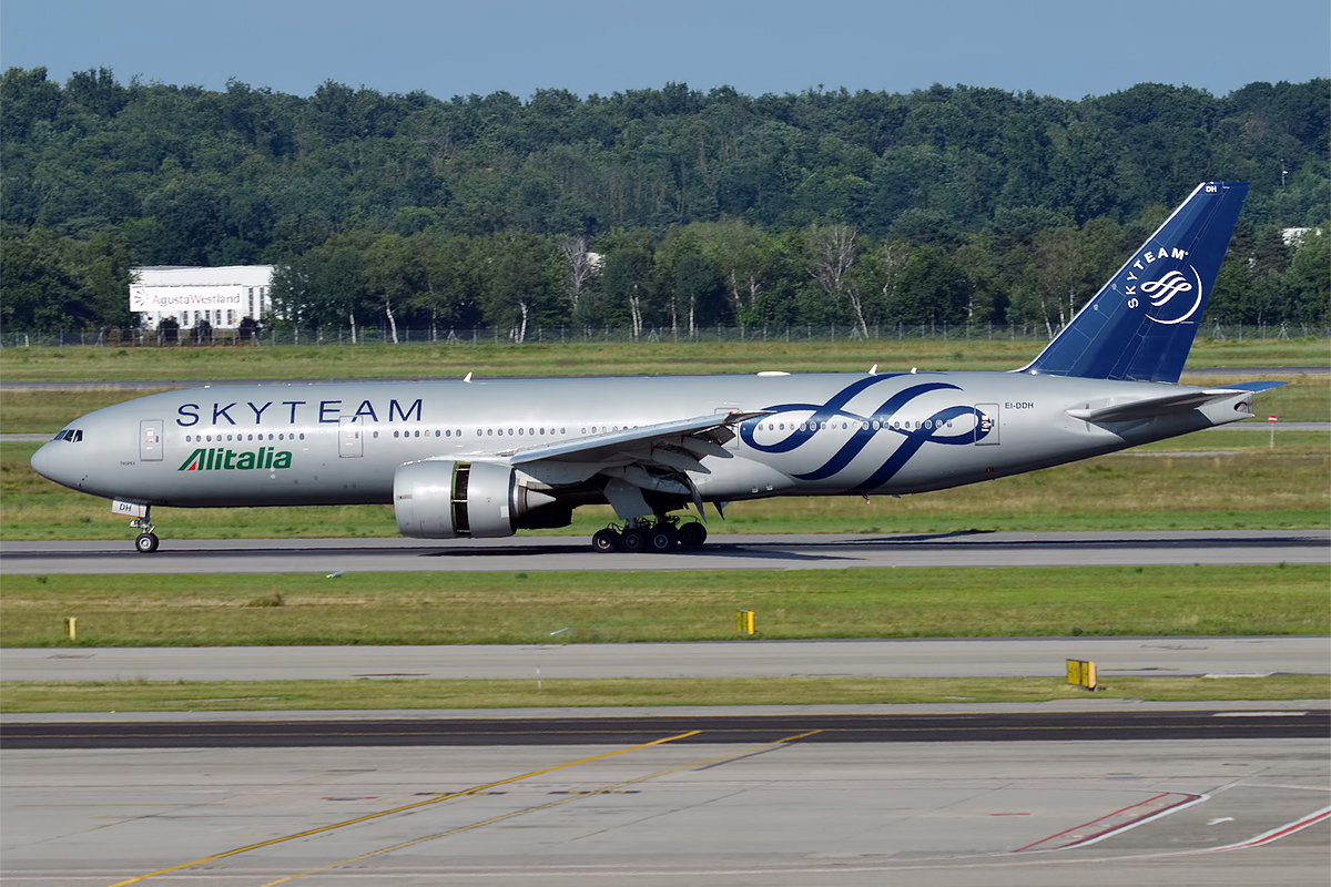 Alitalia, EI-DDH, Boeing 777-243 ER